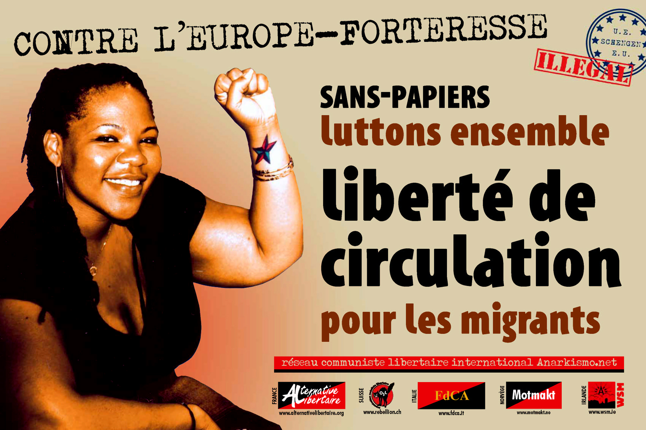 Affiche d' , réseau anarcho-communiste international. Affiche d'Alternative libertaire (AL), organisation communiste libertaire française.